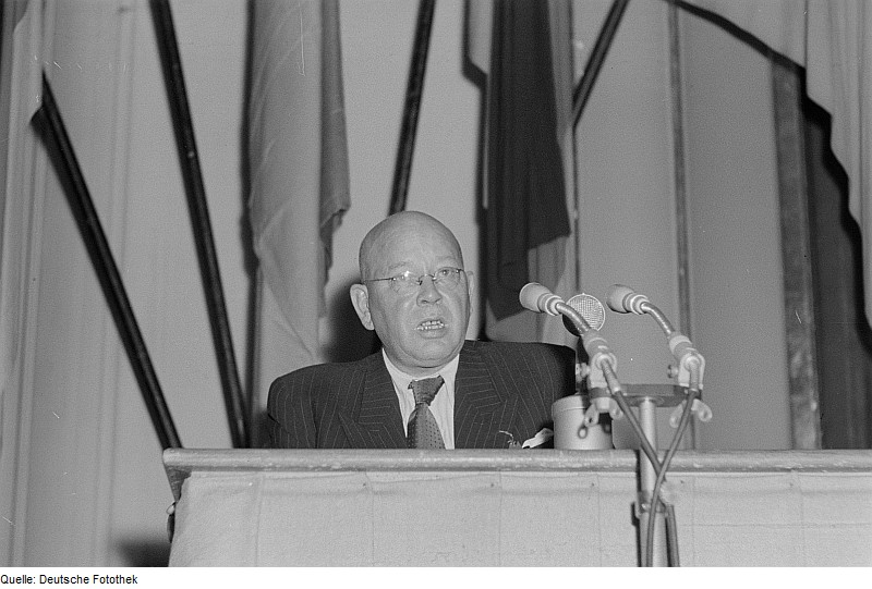 Original image description from the Deutsche Fotothek Josef Orlopp am Rednerpult bei einem "Ausspracheabend des Ministeriums für innerdeutschen Handel", Herbstmesse 1953